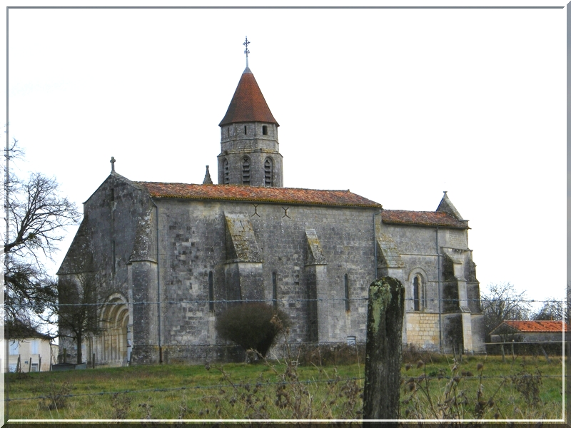 Eglise chermignac 1